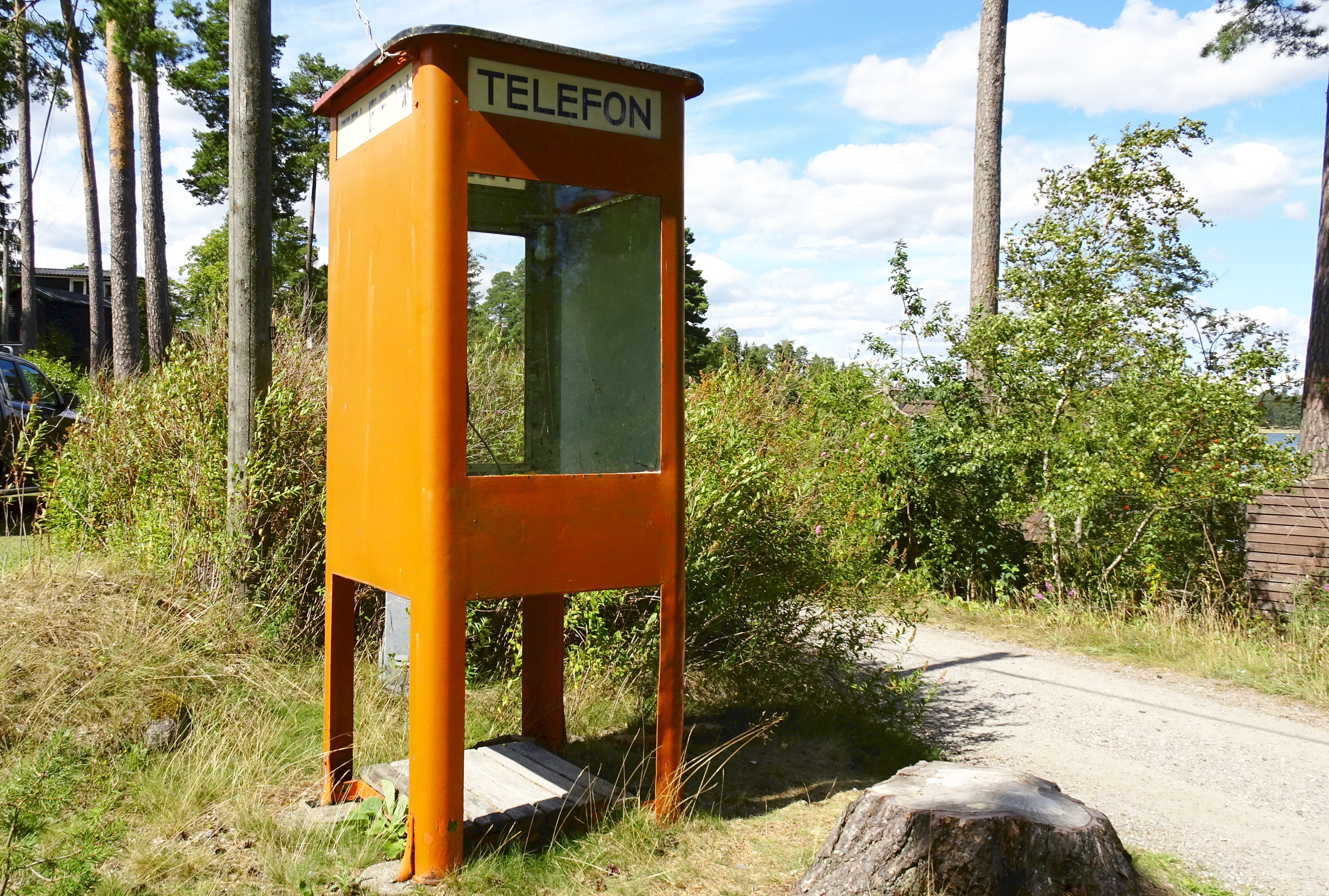 Äldre svensk telefonkiosk i televerksorange